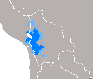 Idioma aimara.